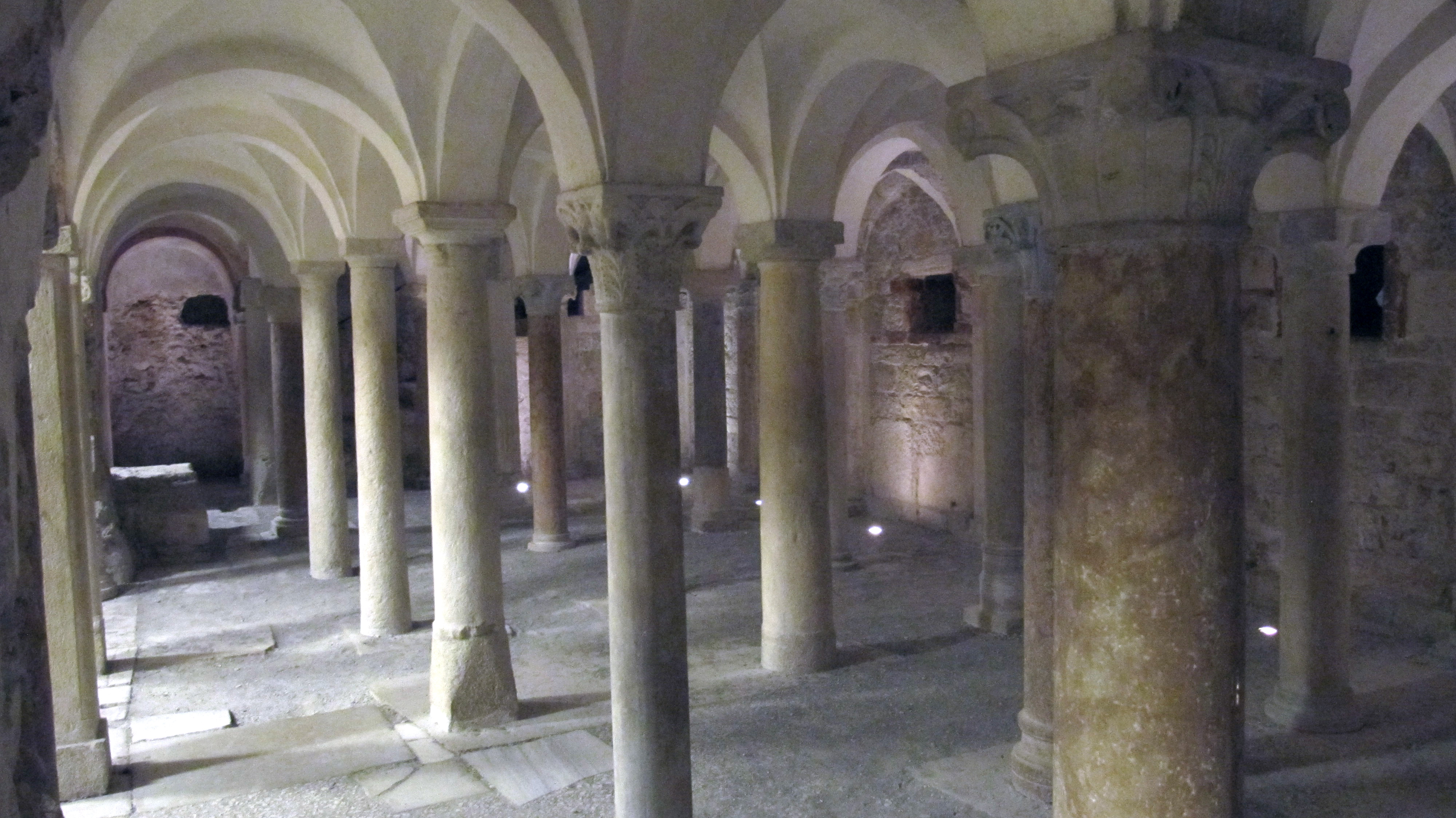 Cripta della chiesa di San Salvatore a Brescia, VIII sec